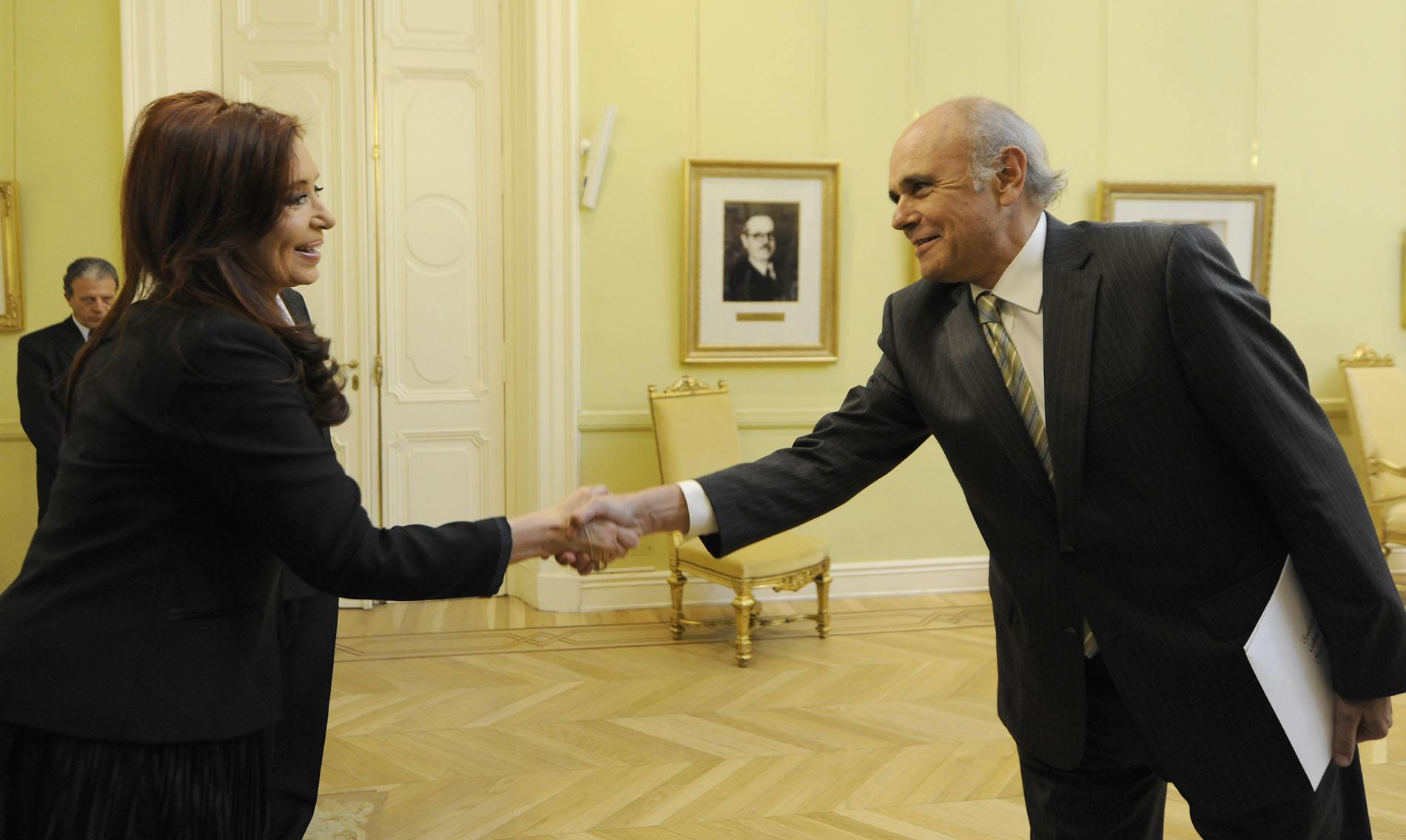 La presidenta Cristina Fernández recibe las cartas credenciales del embajador de la República del Perú, Nicolás Javier Lynch Gamero. La acompaña el canciller Héctor Timerman.